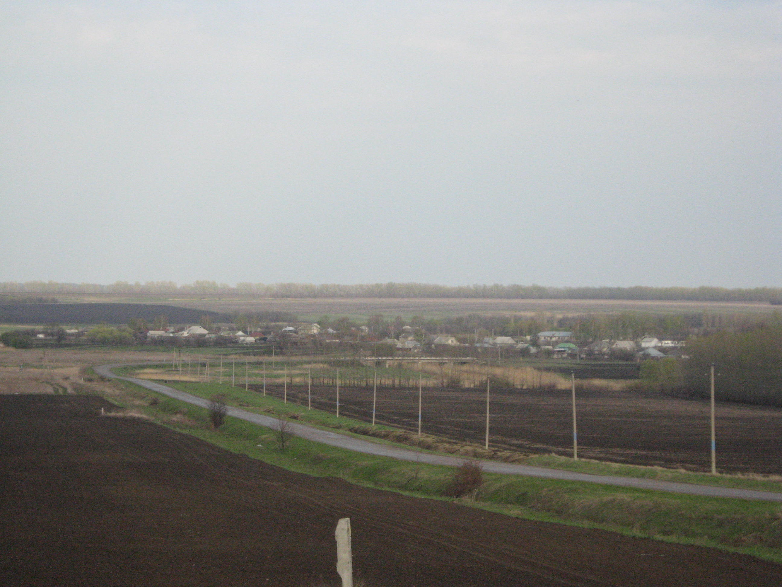 Видно село.